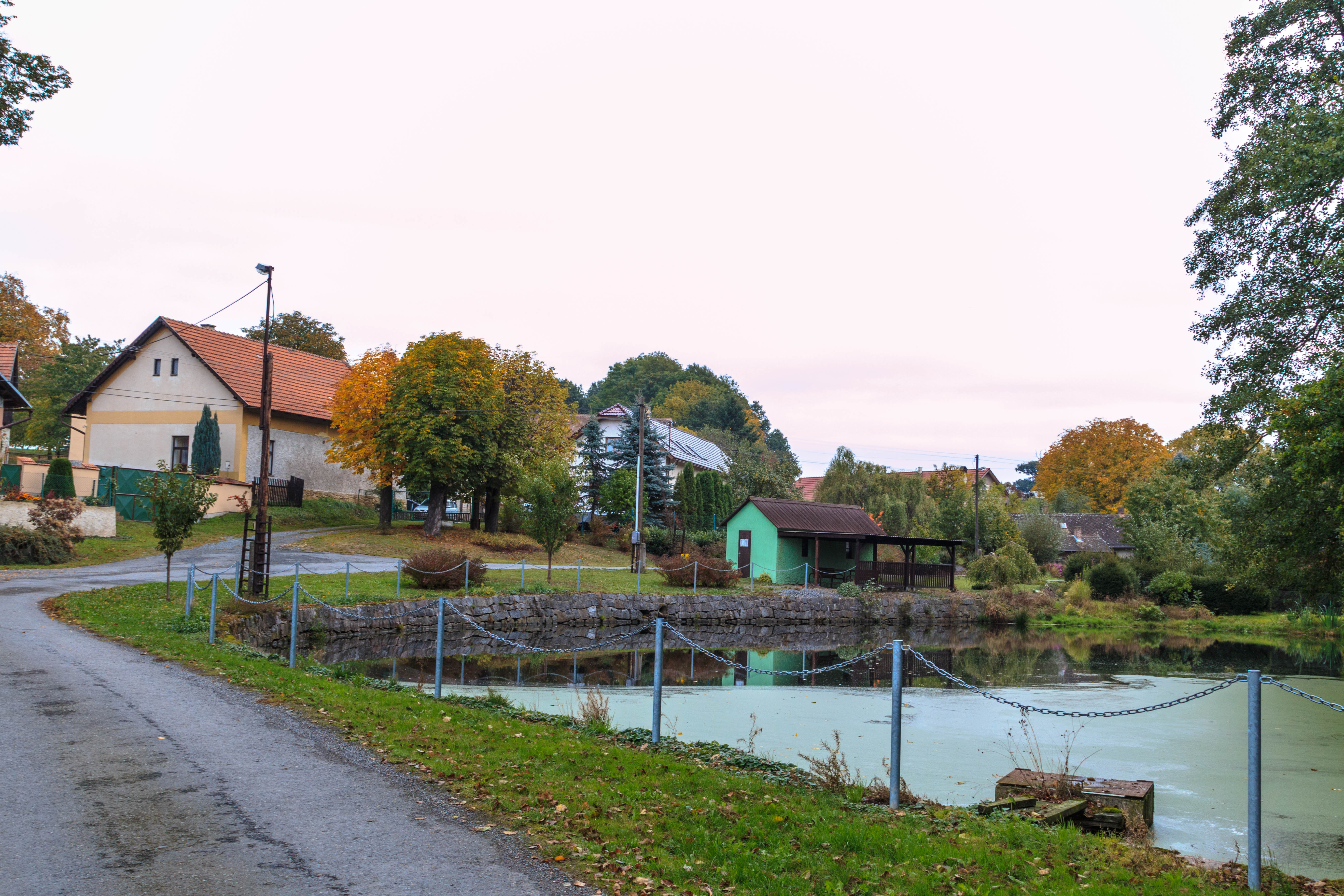 Kraborovice čp. 12